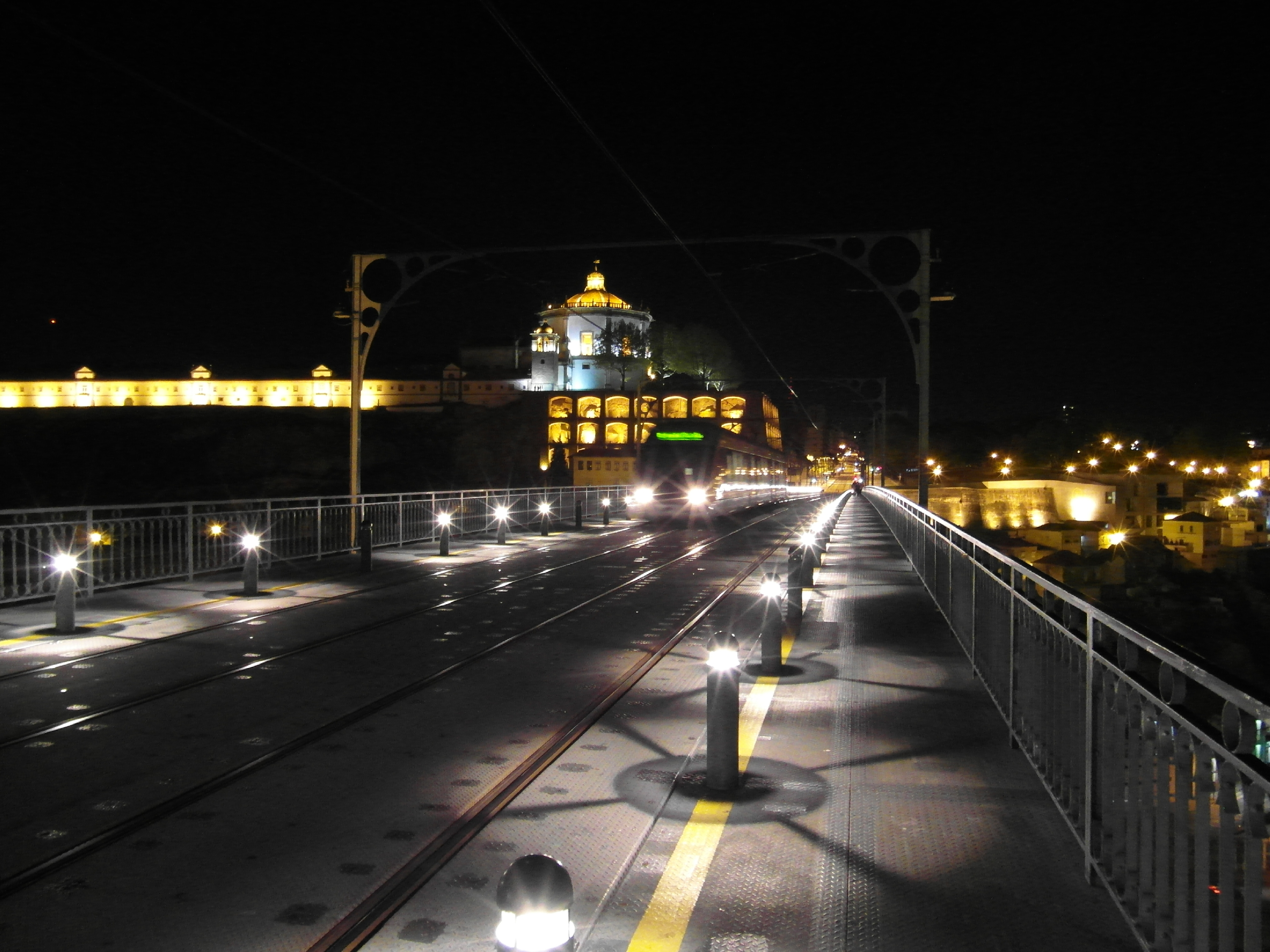 Ponte de D. Luís - Ponte Luís I